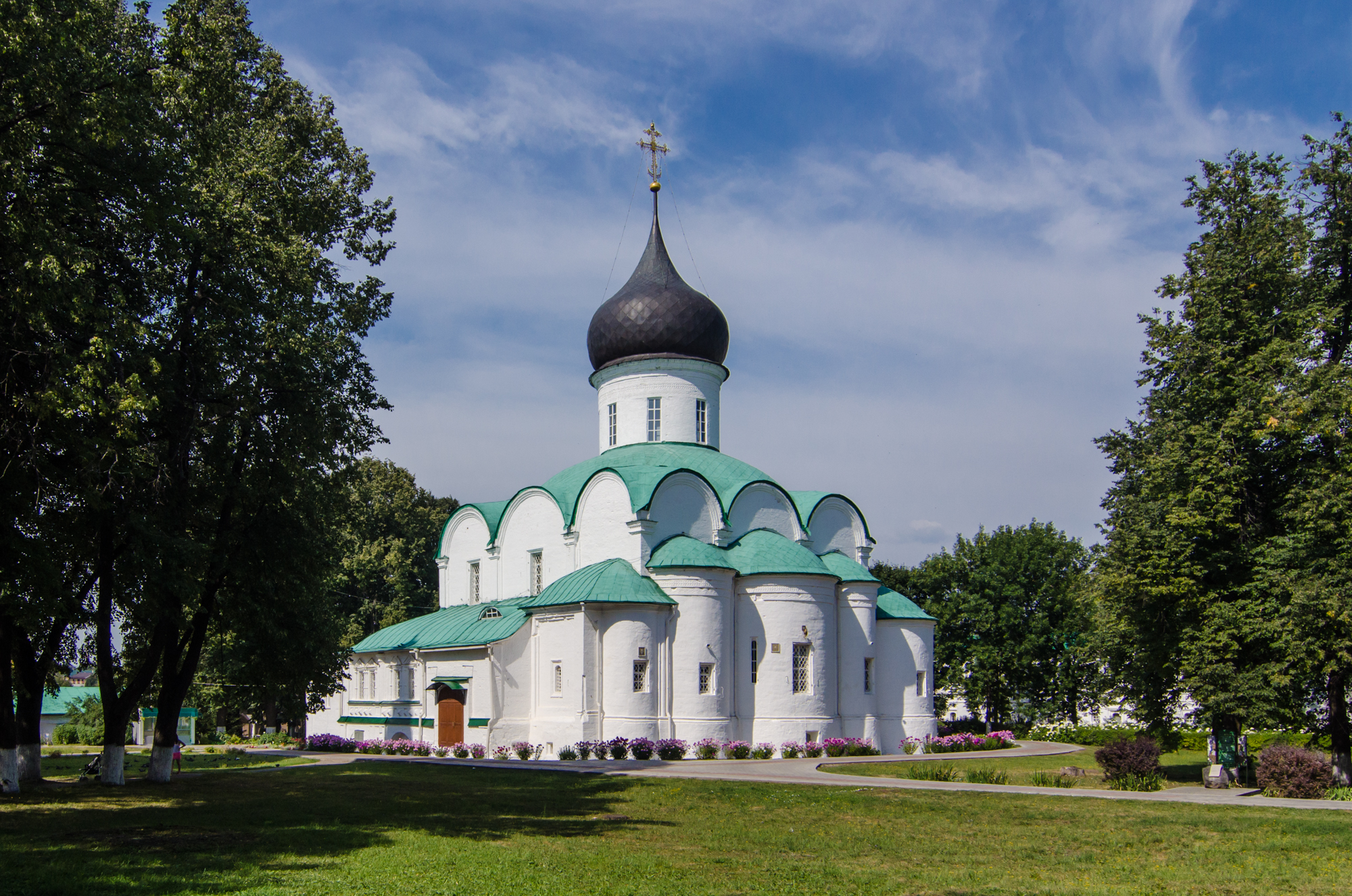 Троицкий собор: Музейный проезд, 18, Александров, Александровский район, Владимирская область